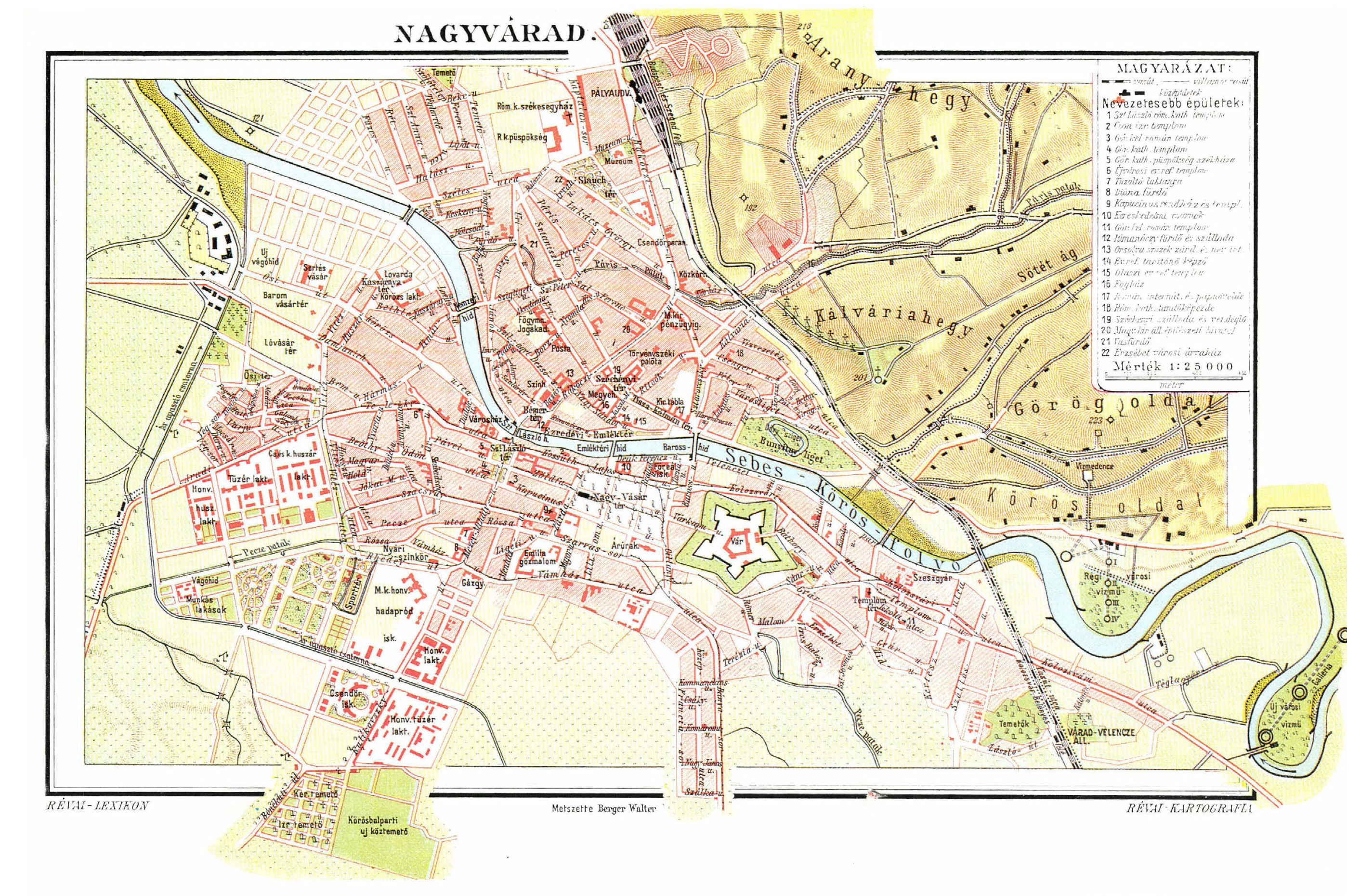 Révai Lexikon, Rajzolta: Berger Walter